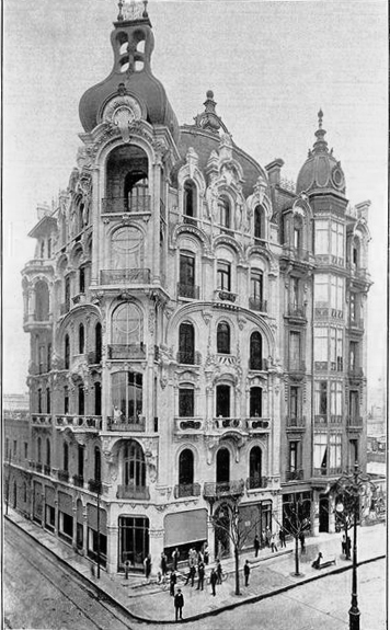 Antiguo Hotel Lutecia (Arq. Louis Dubois, 1906-09) actualmente Hotel Chile, como se veía antes del incendio que sufrió en 1988. Avenida de Mayo esquina Santiago del Estero.